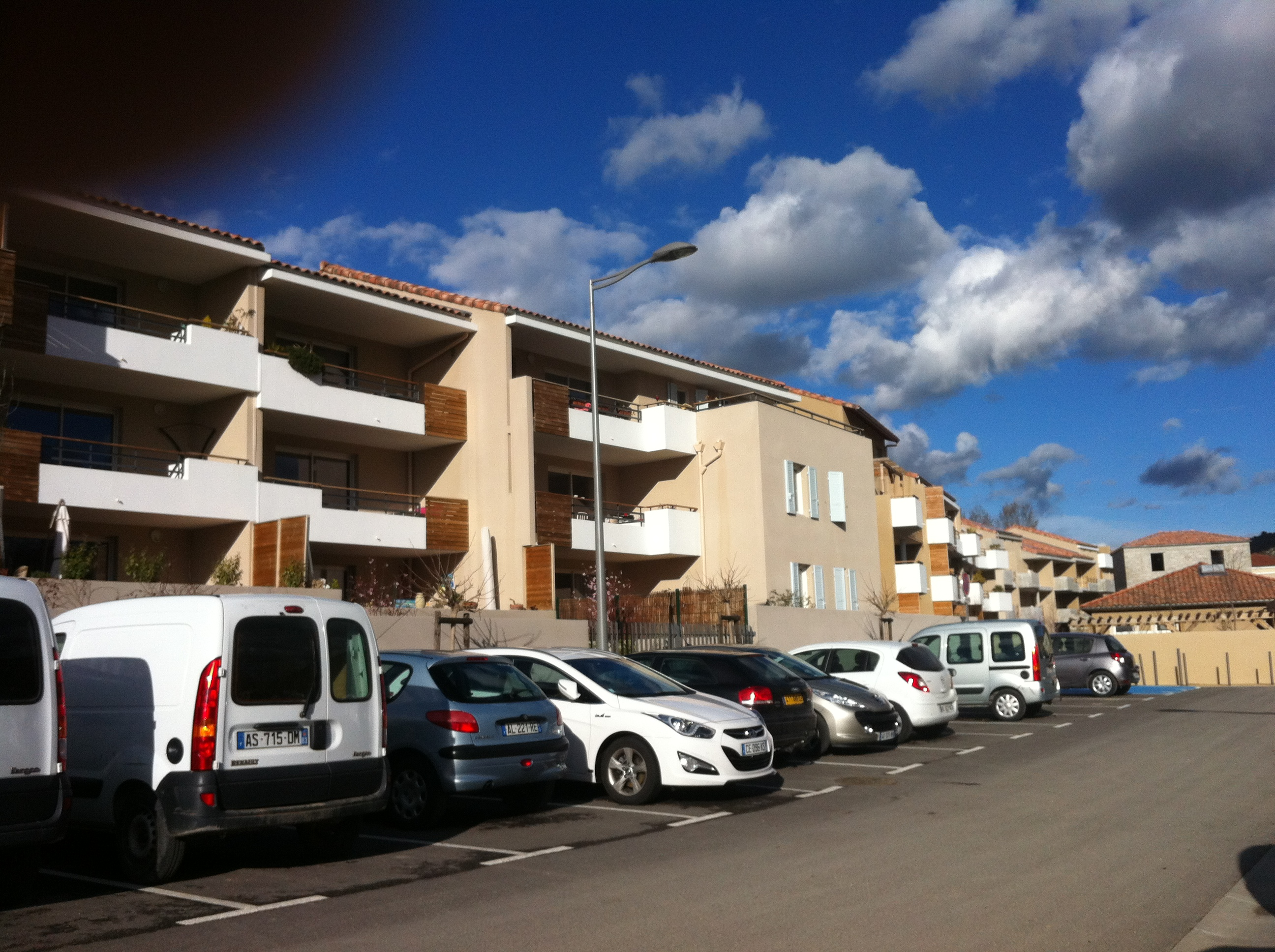 logements